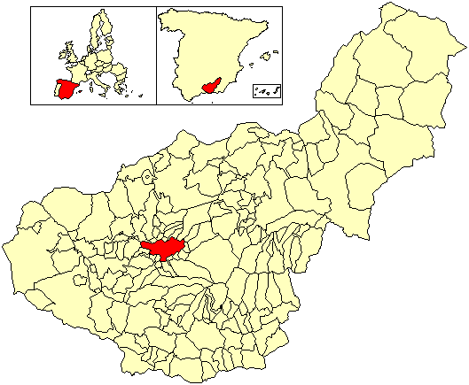 Situación del término municipal de Granada respecto a la provincia de Granada, en España.